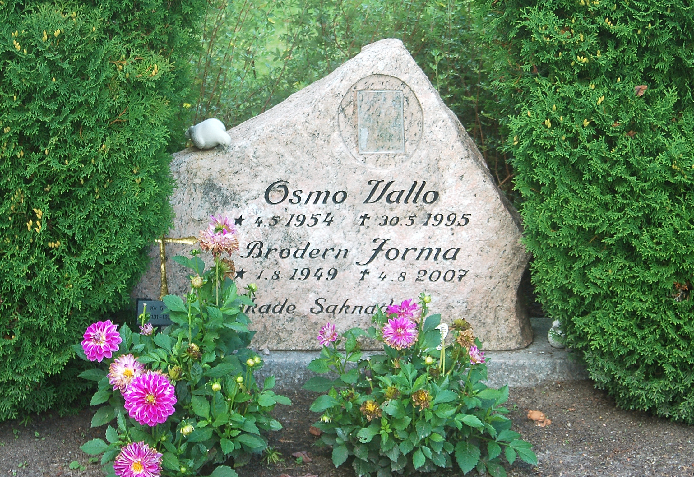 Minnesvård för Osmo Vallo 1954-1995 samt brodern Jorma Vallo 1949-2007 vid Alsters kyrkogård